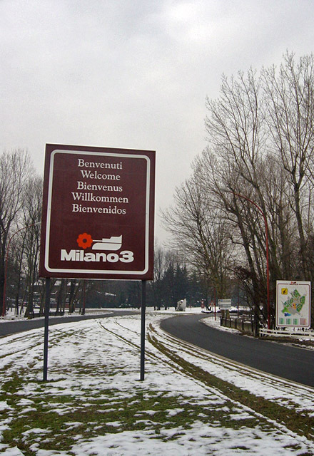 Simbolo di Milano 3